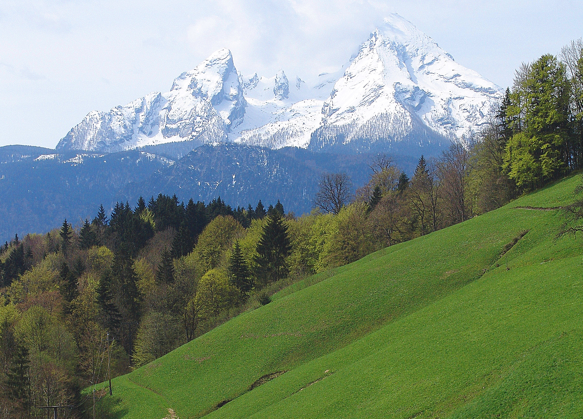 Blick auf den über 2700 Meter hohen Watzmann bei Berchtesgaden. Entstanden ist diese Aufnahme bei einer Wanderung zur Kneifelspitze. Kamera: Sony DSC F 828 Focal length 28 mm